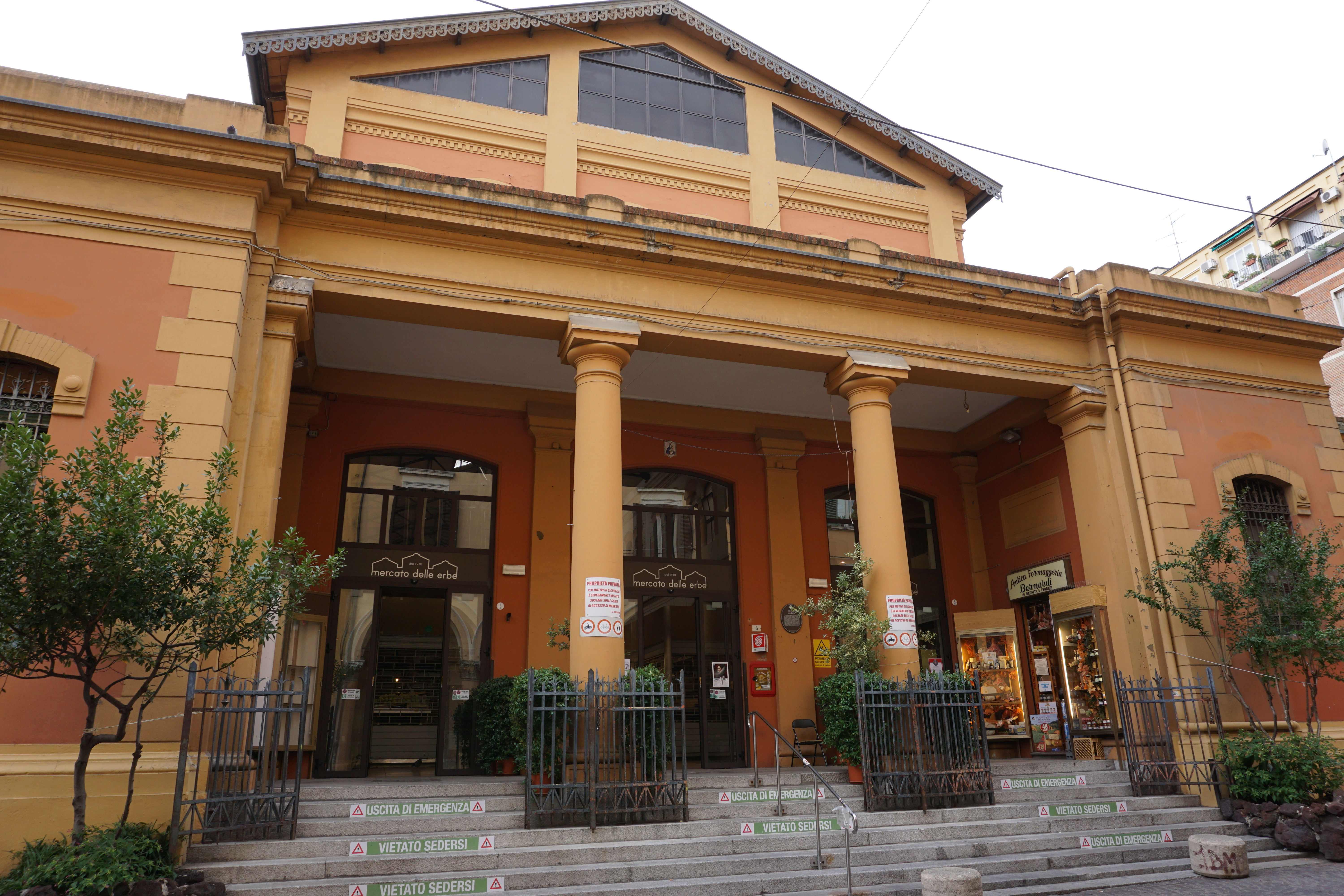 Mercato delle Erbe This is a photo of a monument which is part of cultural heritage of Italy.